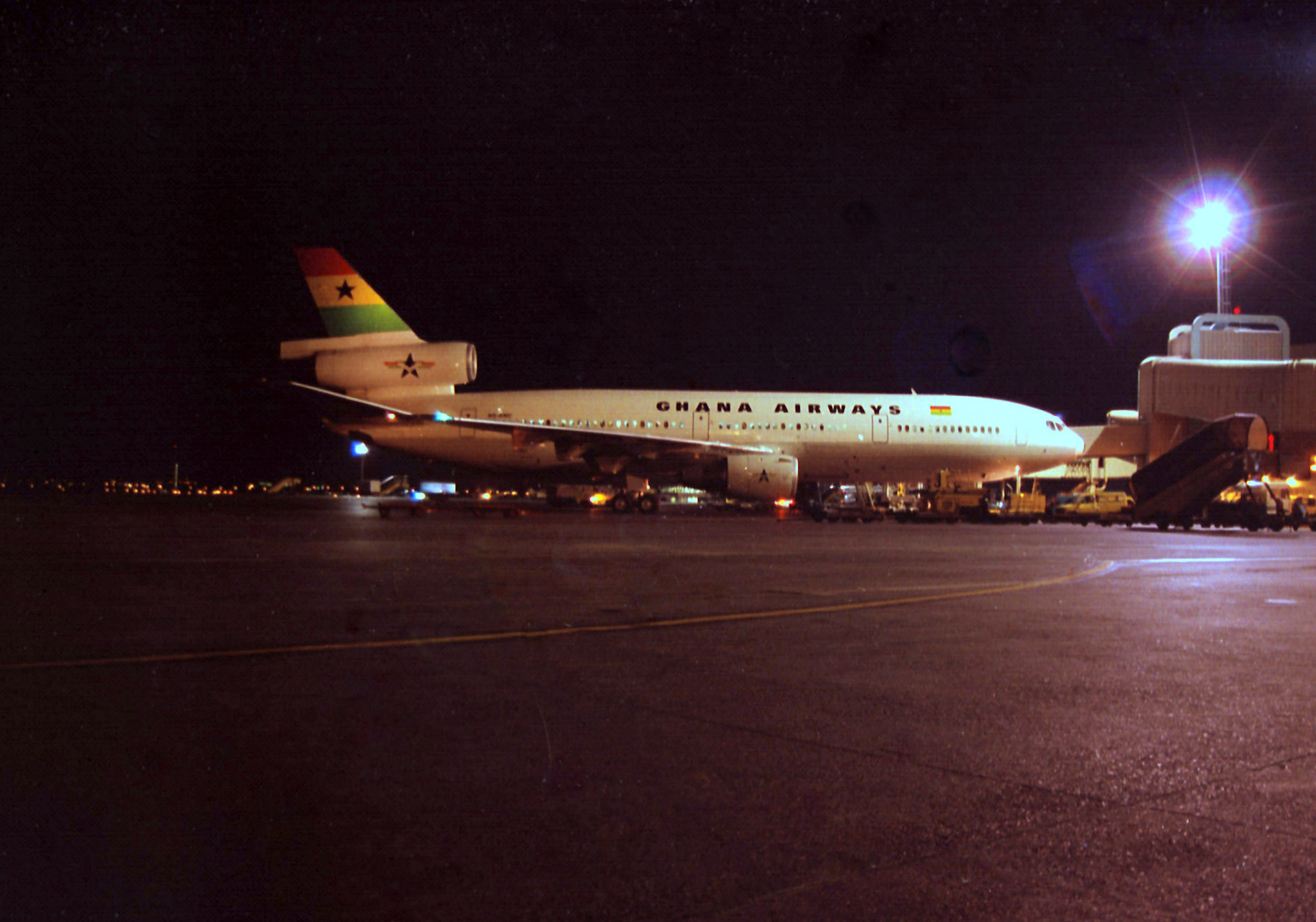 Ghana Airways DC10-30 9G-ANC